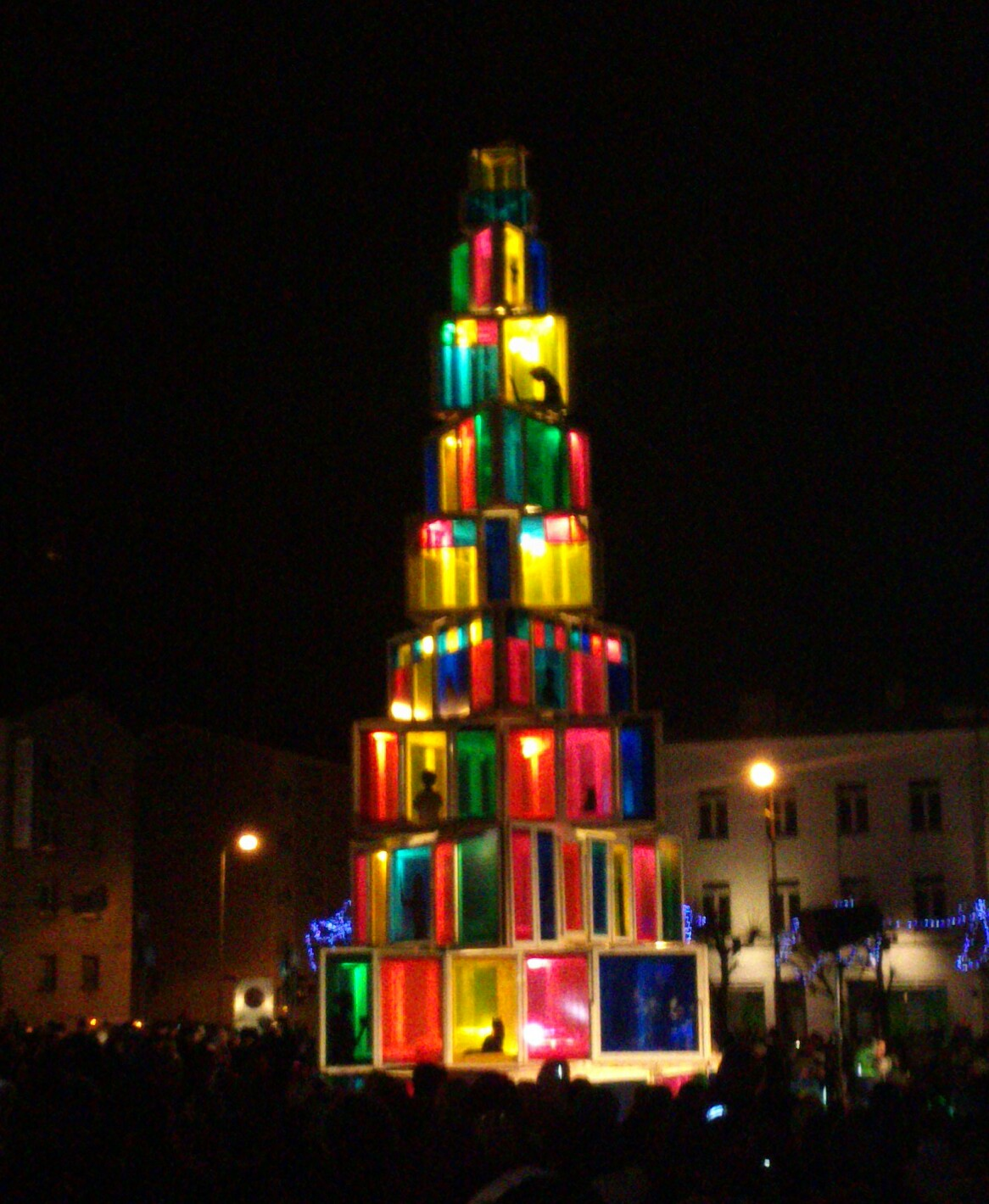 Rakvere jõulukuusk 2015